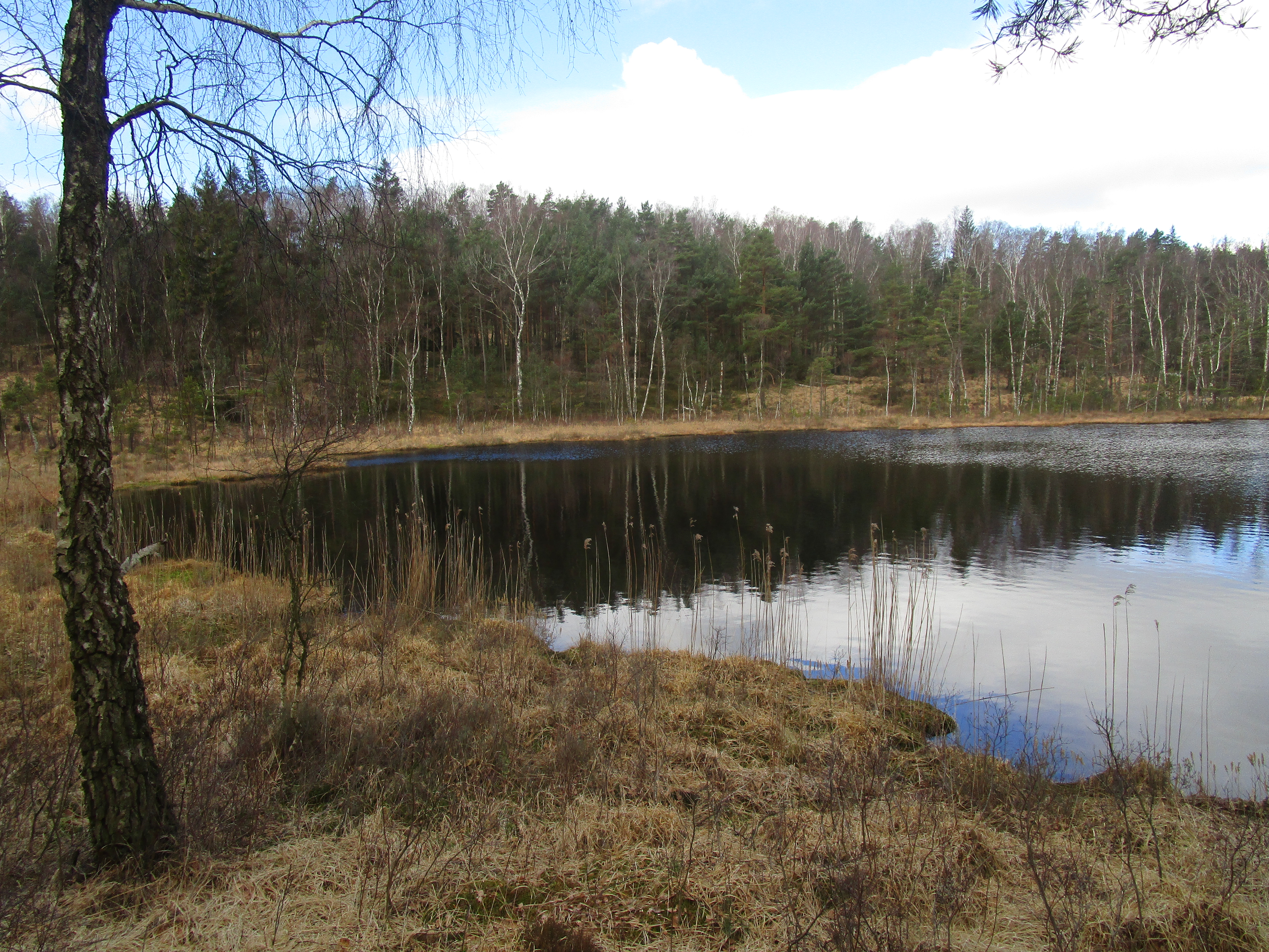 Knipeflågs tjärn södra änden 31 mars 2020.